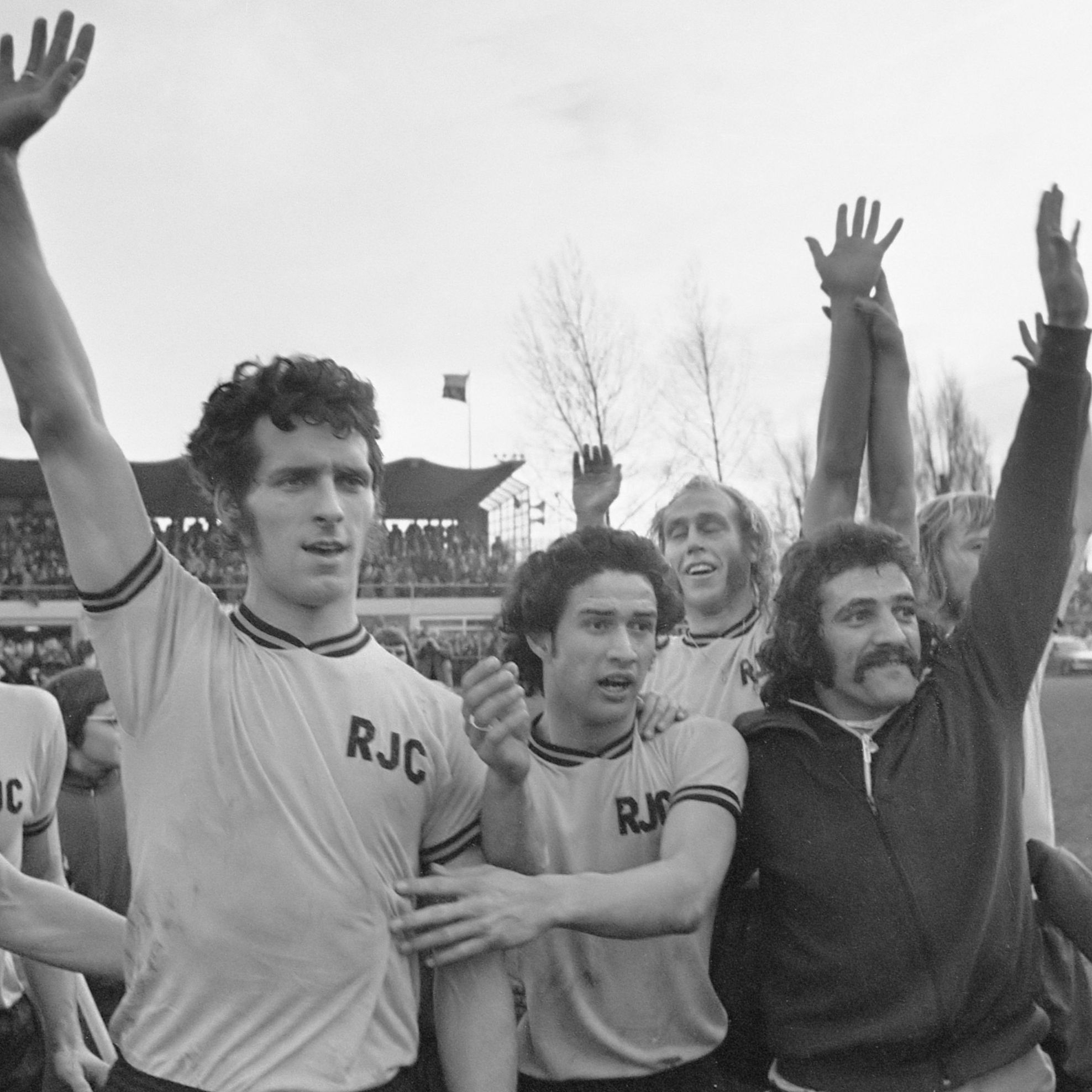 Roda JC tegen Feyenoord 1-0, vrolijke Roda-spelers na afloop. V.l.n.r. Jo "Woem" Korver, Dick Nanninga, Stanley Bish, Jos Dijkstra, Gerrie de Goede en Peter de Wit. Eerste overwinning van Roda JC op Feyenoord 12 januari 1975